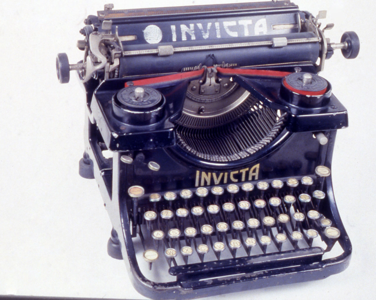 Macchina standard con con telaio in ghisa, verniciata di nero, poggiante su quattro piedini circolari, rivestiti di gomma. La tastiera presenta 44 tasti rotondi, con sfondo bianco e bordo in plastica; la barra spaziatrice è in metallo verniciato di nero. Gli 88 caratteri sono montati su martelletti riposanti nella cesta delle leve semicircolare. Ai lati della cesta sono collocate le due bobine di nastro inchiostrato; il comando per la selezione del colore del nastro è situato nella parte sinistra del lato frontale della macchina. La macchina è dotata di tabulatore. Il carrello monta un rullo rivestito di gomma e presenta la leva di ritorno sul lato sinistro Sul retro della macchina è situato un campanello per l'avvertimento di fine riga. Modalità d'uso L'abbassamento di un tasto aziona il cinematico e il martelletto portacaratteri scatta, colpendo il punto di battitura da posizione frontale. Il tasto delle maiuscole comanda il sollevamento del carrello. L'inchiostrazione avviene mediante nastro inchiostrato inserito in un sollevanastro. Attraverso un sistema di scappamento, il carrello portacarta compie uno spostamento ad ogni battuta di tasto, permettendo la composizione di una riga. La scrittura è pienamente visibile